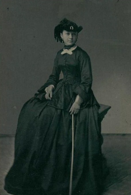 Мария Александровна Дараган (ум. 1877), жена К. А. Рачинского.